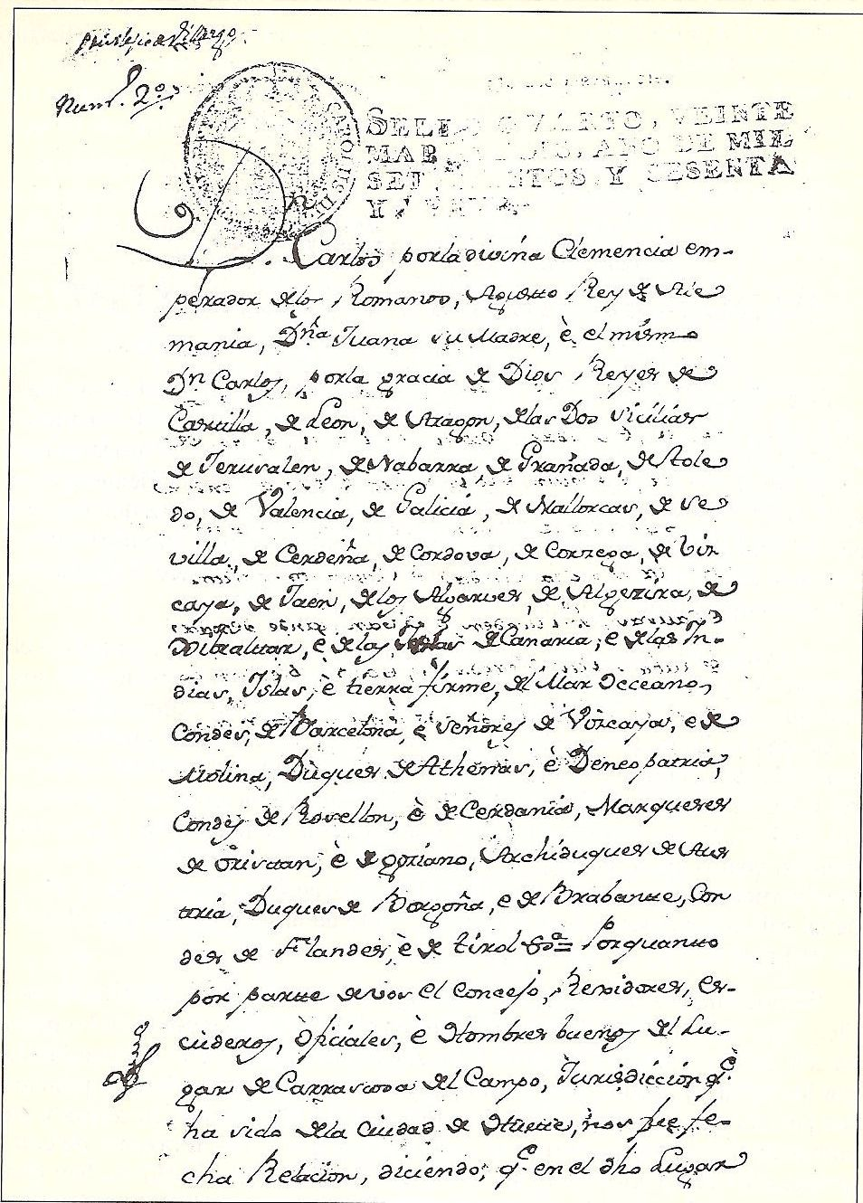 Nombramiento de Villa a Carrascosa del Campo